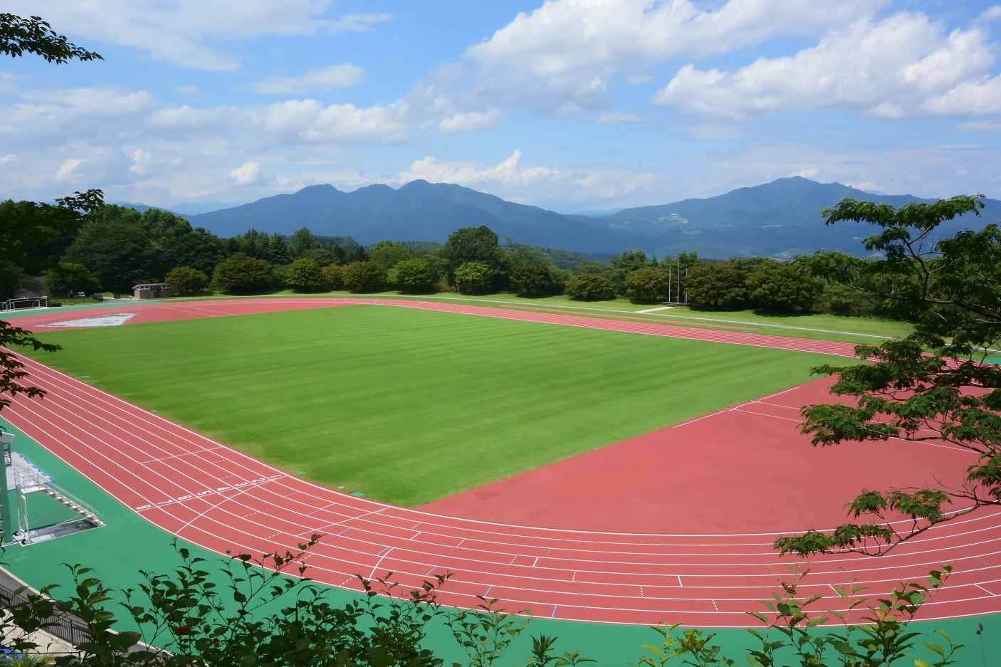 渋川市総合公園内にある陸上競技場。